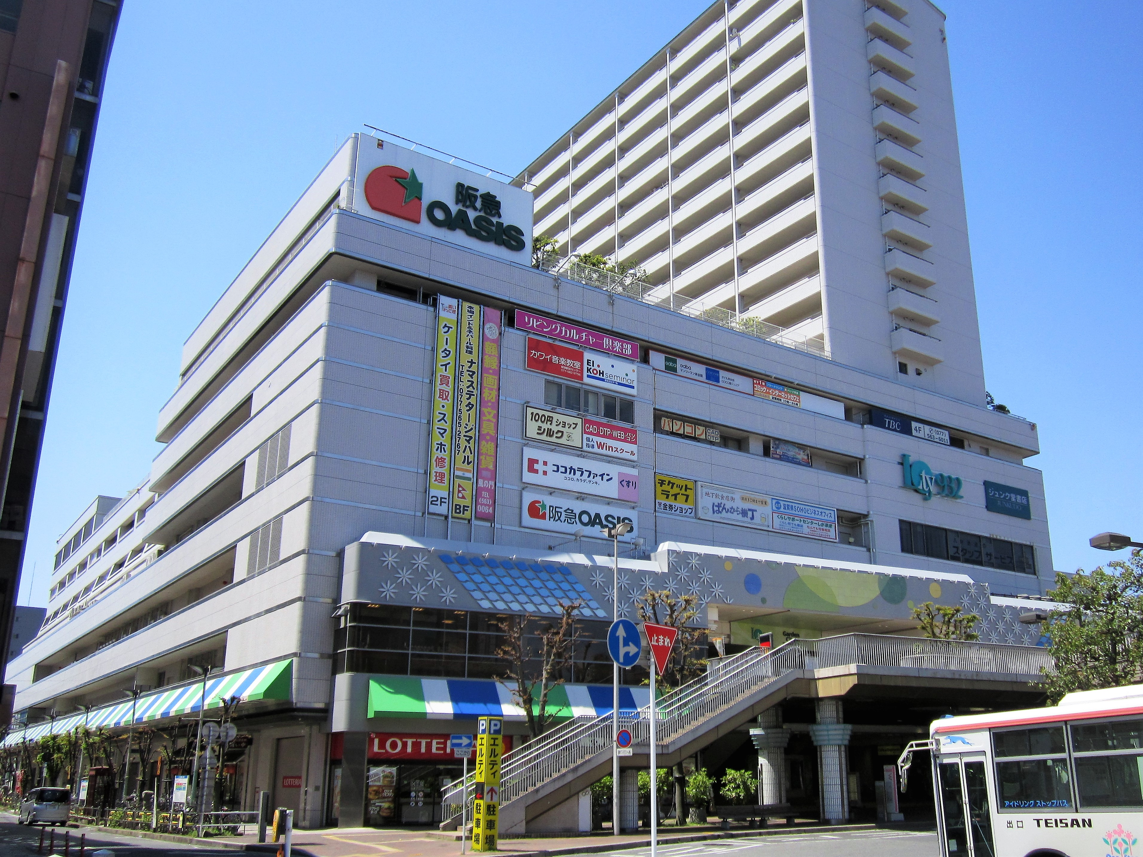 Lty932・ガーデンシティー草津（草津市大路）